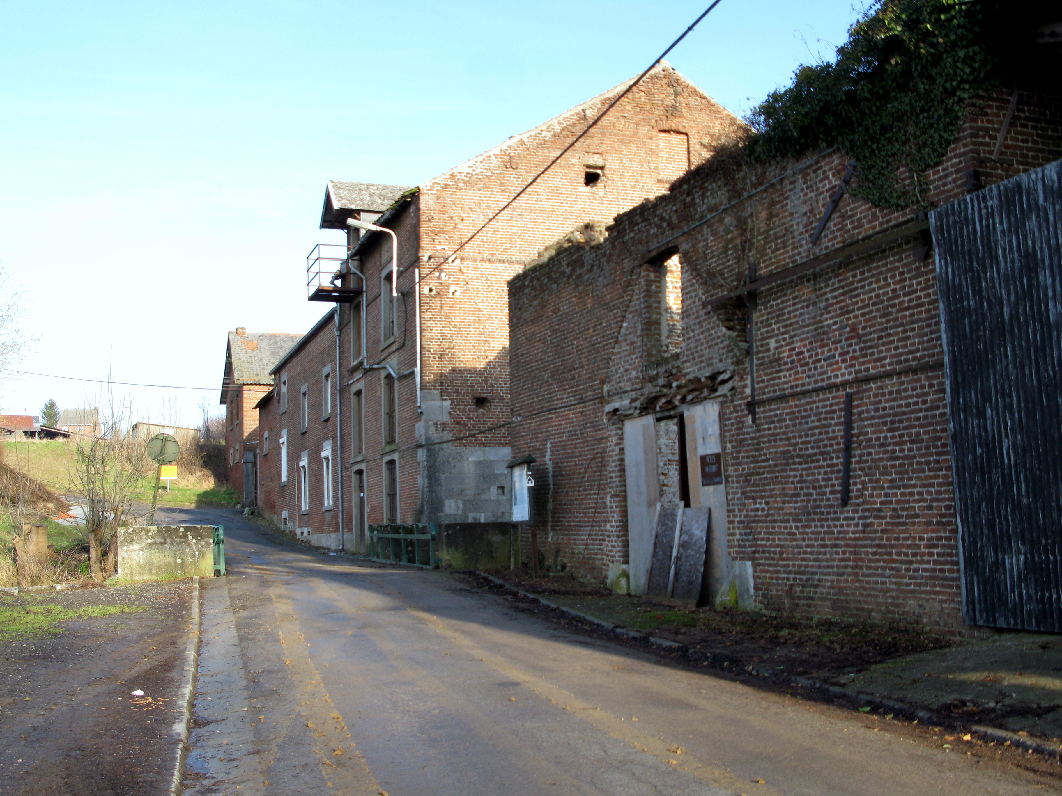 D'Mille vu Vélupont am Dall vun der Mehaigne